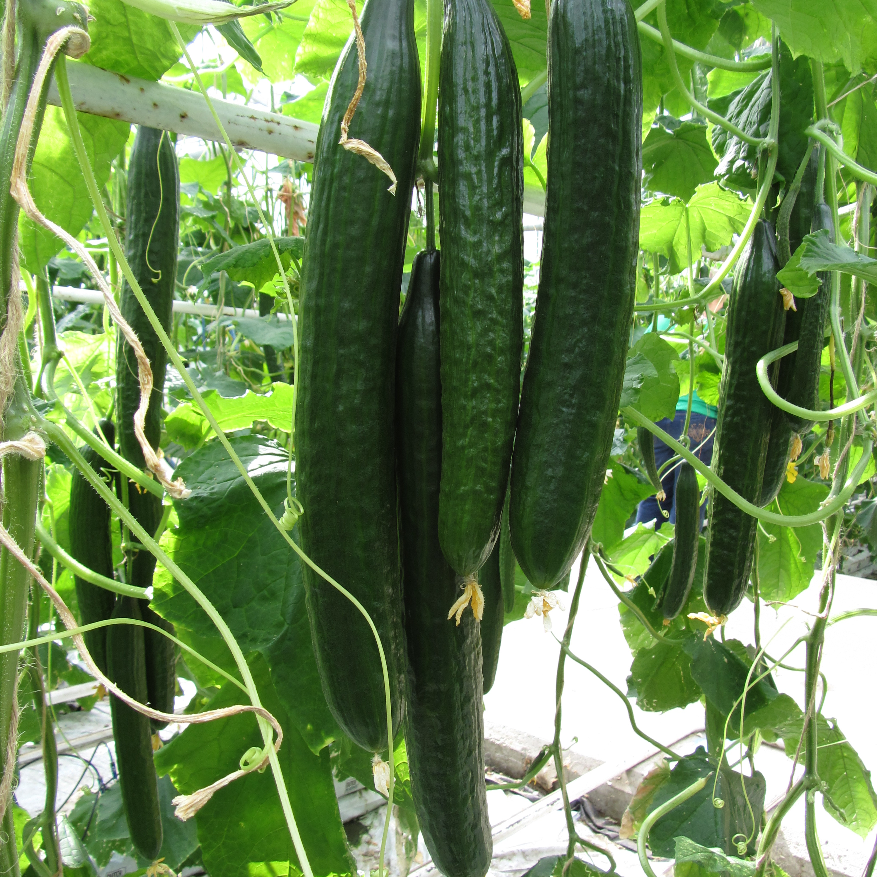 Gurkenproduktion im Glashaus